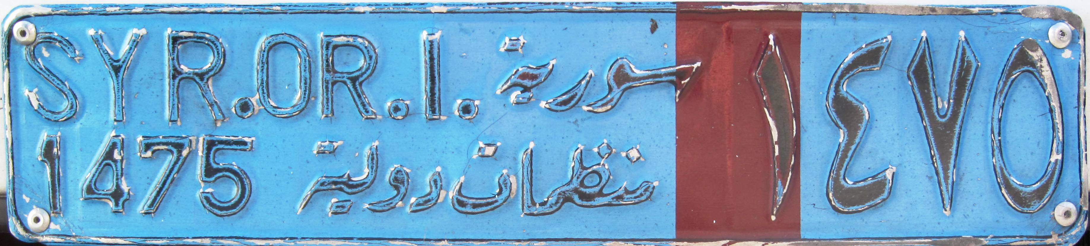 UN kentekenplaat Syrië